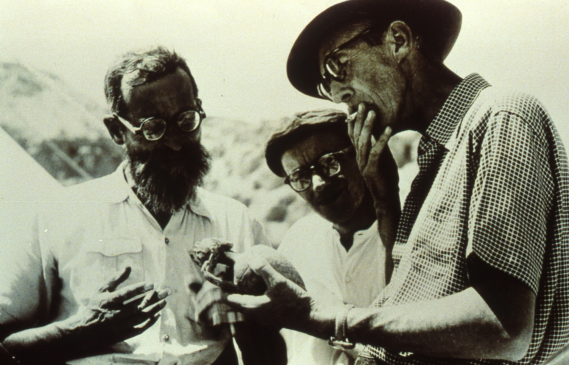 ג'רלד לנקסטר הרדינג, רולאן דה וו וז'וזף מיליק בחפירות קומראן, 1954